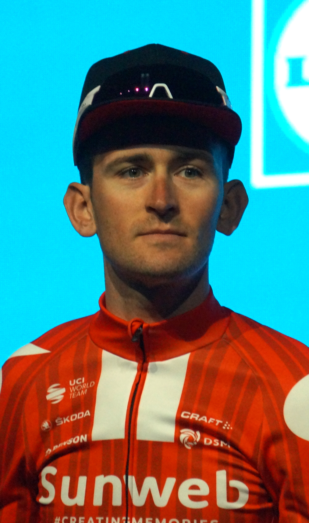 Tiesj Benoot bij de ploegenvoorstelling in Gent voor de Omloop Het Nieuwsblad 2020